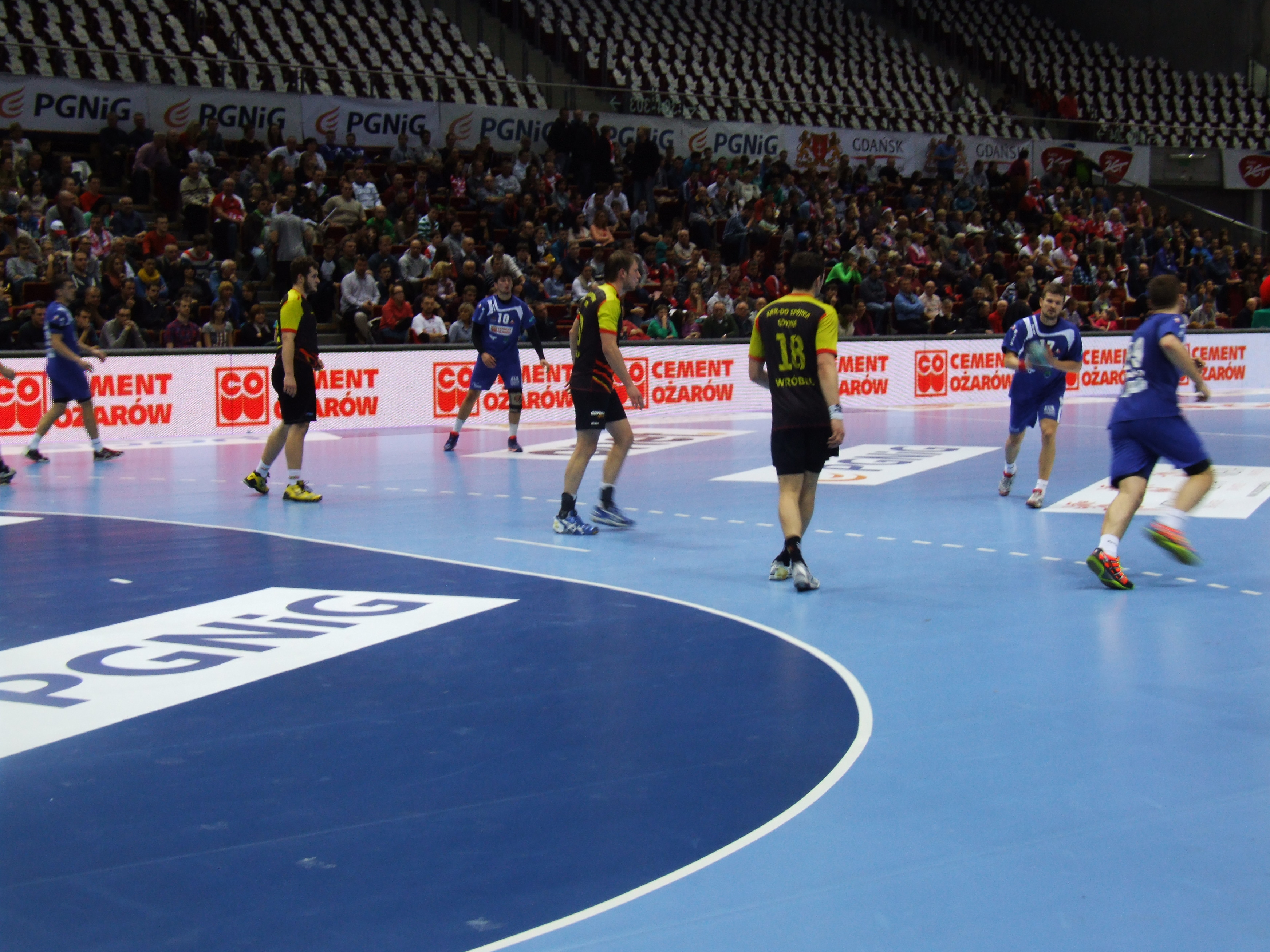 Mecz I ligi piłki ręcznej SPR Wybrzeże Gdańsk - Kar-Do Spójnia Gdynia w Ergo Arenie.